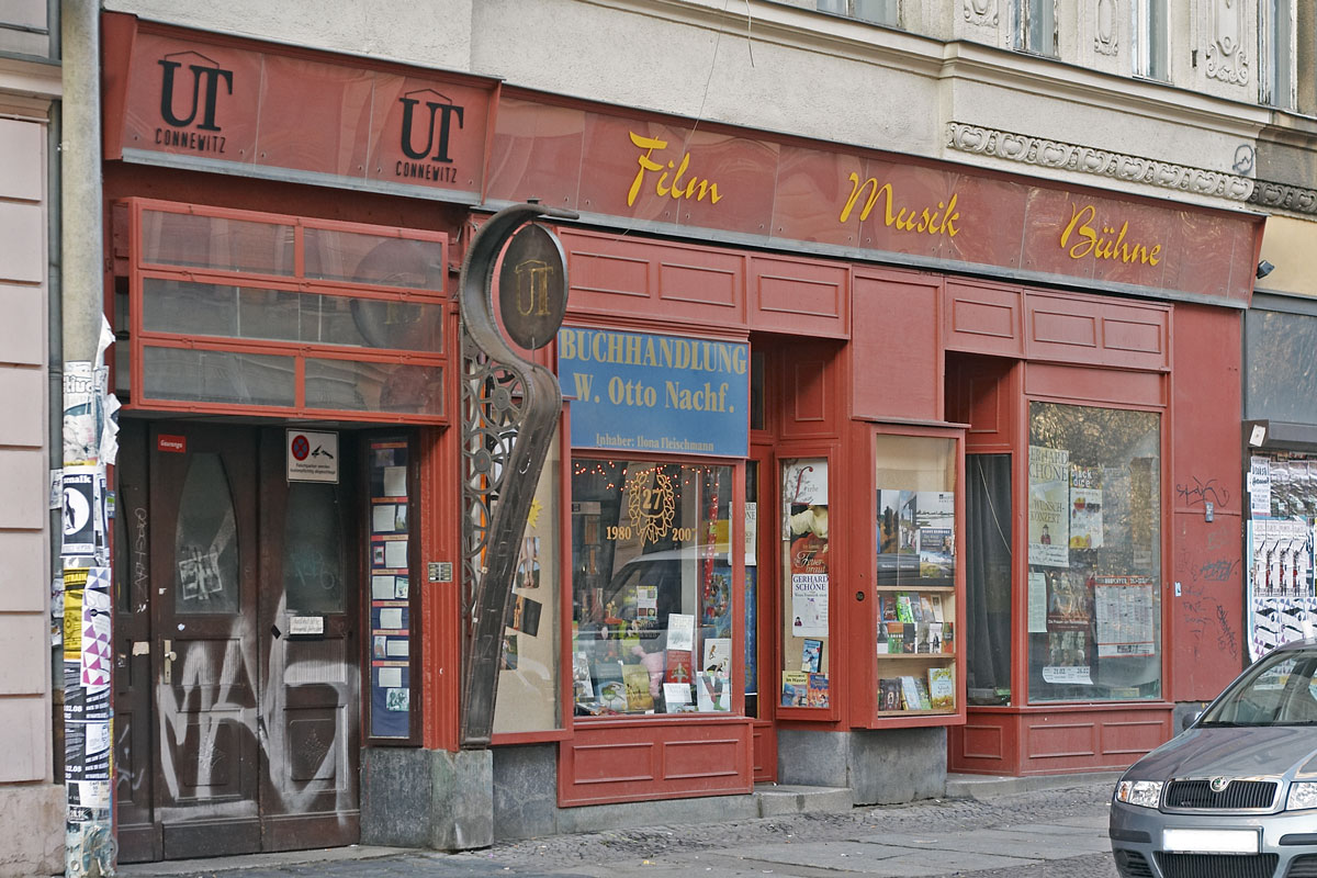 UT Connewitz in Leipzig